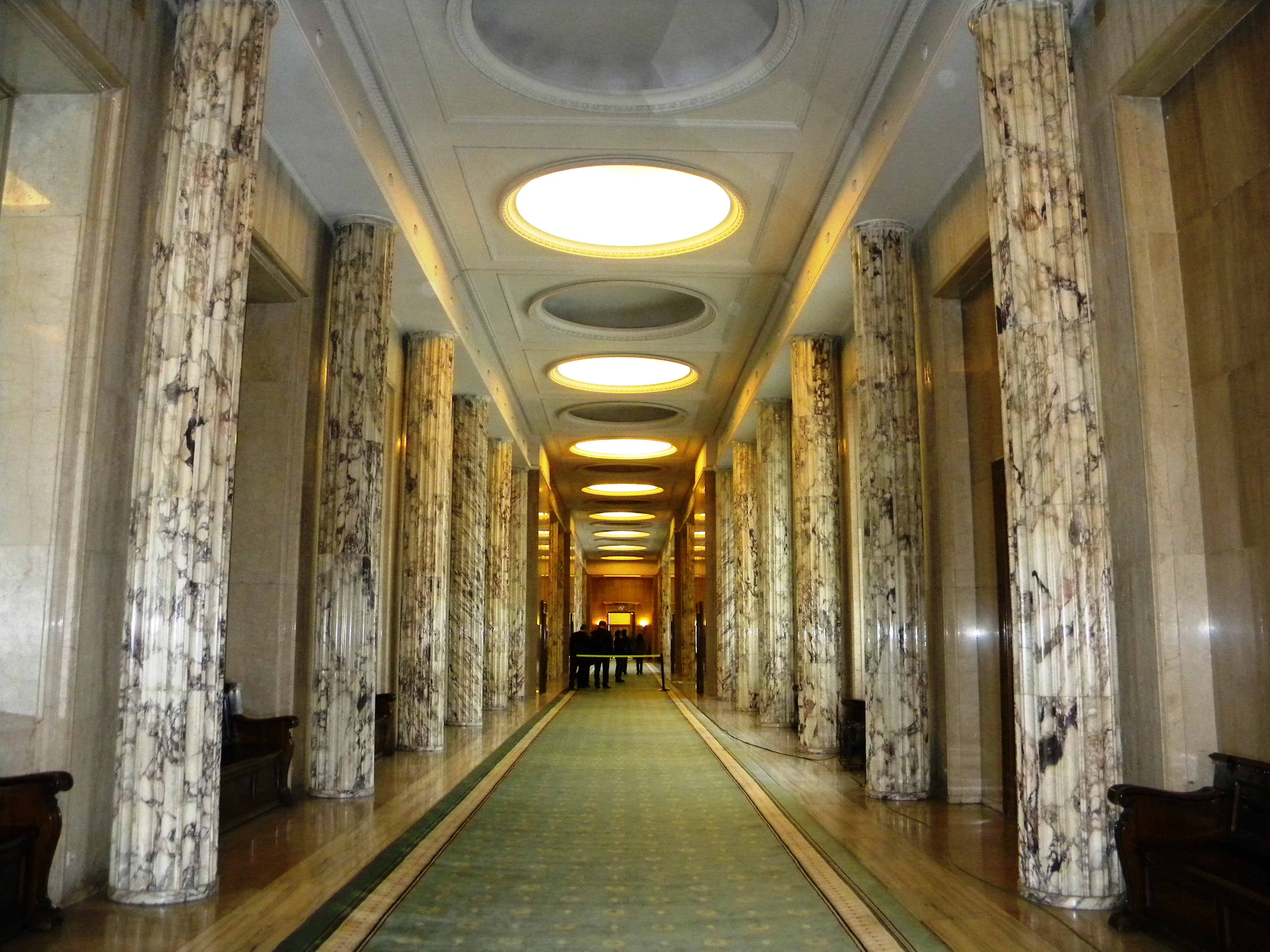 ROMANIA, Bucuresti, 1. Dec. 2015, Palatul Guvernului (interior 6)